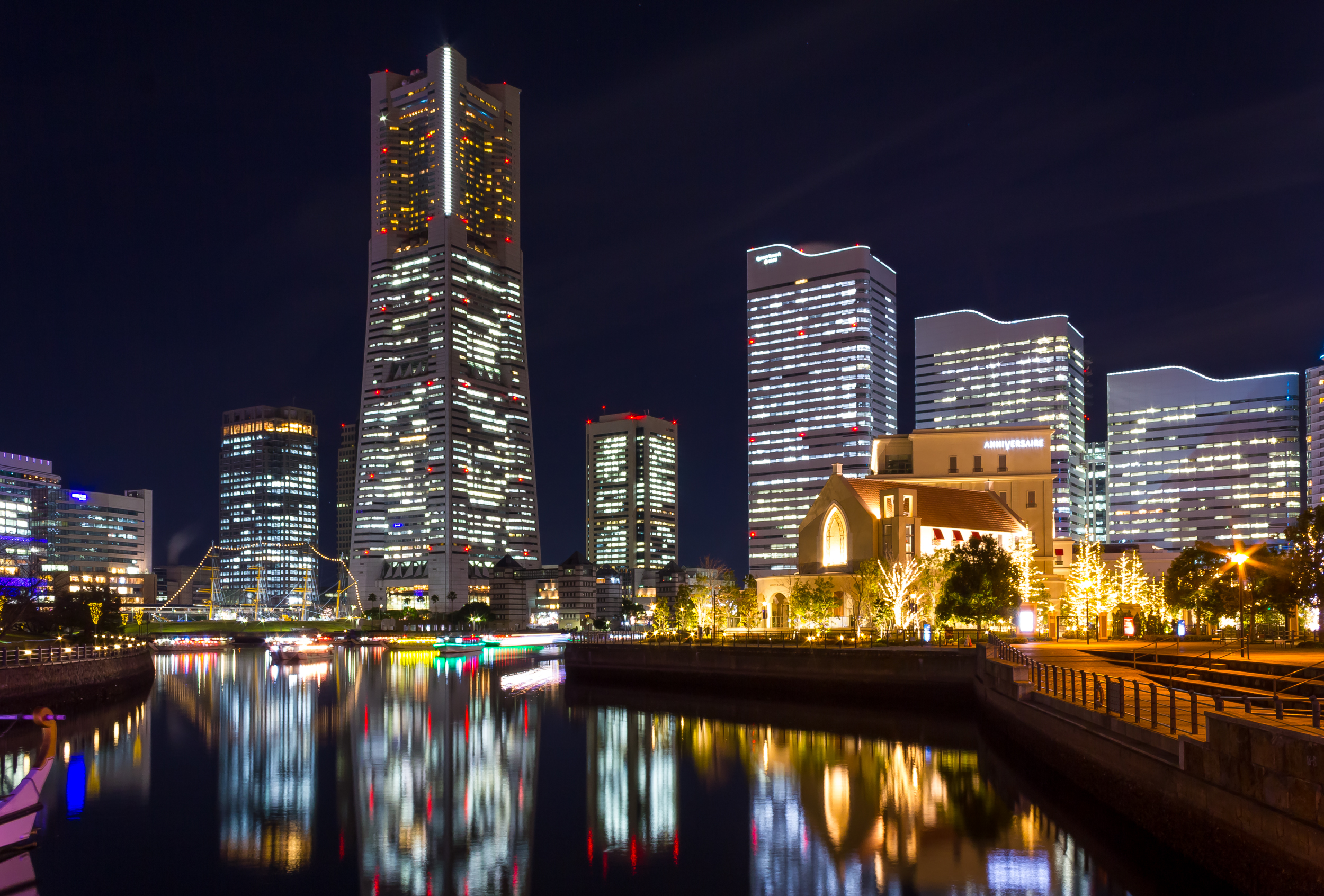 Yokohama Landmark Tower（神奈川県横浜市）